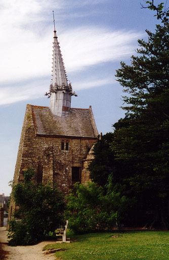 Description : Plougrescant (22) - La chapelle Saint Gonery Date : 1997 Auteur : Ifernyen Source : Archives personnelles, scan d'après tirage argentique Statut : GFDL Ifernyen